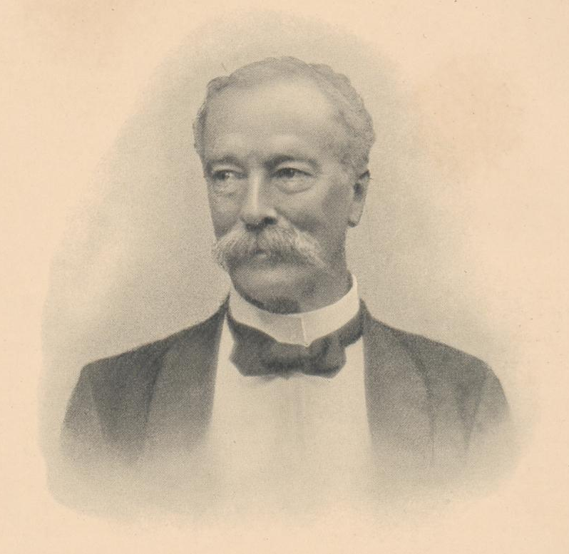 Foto in 1913 afgedrukt bij toespraak ter gelegenheid van 25 jaar regerinsadviseur voor visserijzaken.